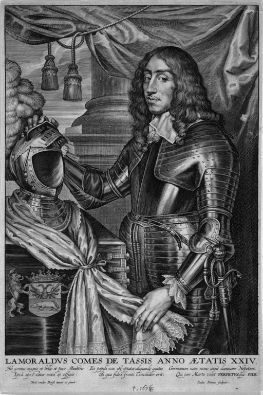 Kupferstich: Der kaiserliche Generalerbpostmeister Lamoral Claudius Franz von Thurn und Taxis, Nicol vander Horst (Maler) invenit et pinxit. Paulus Pontius (Stecher) sculpsit